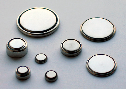 Some coincells